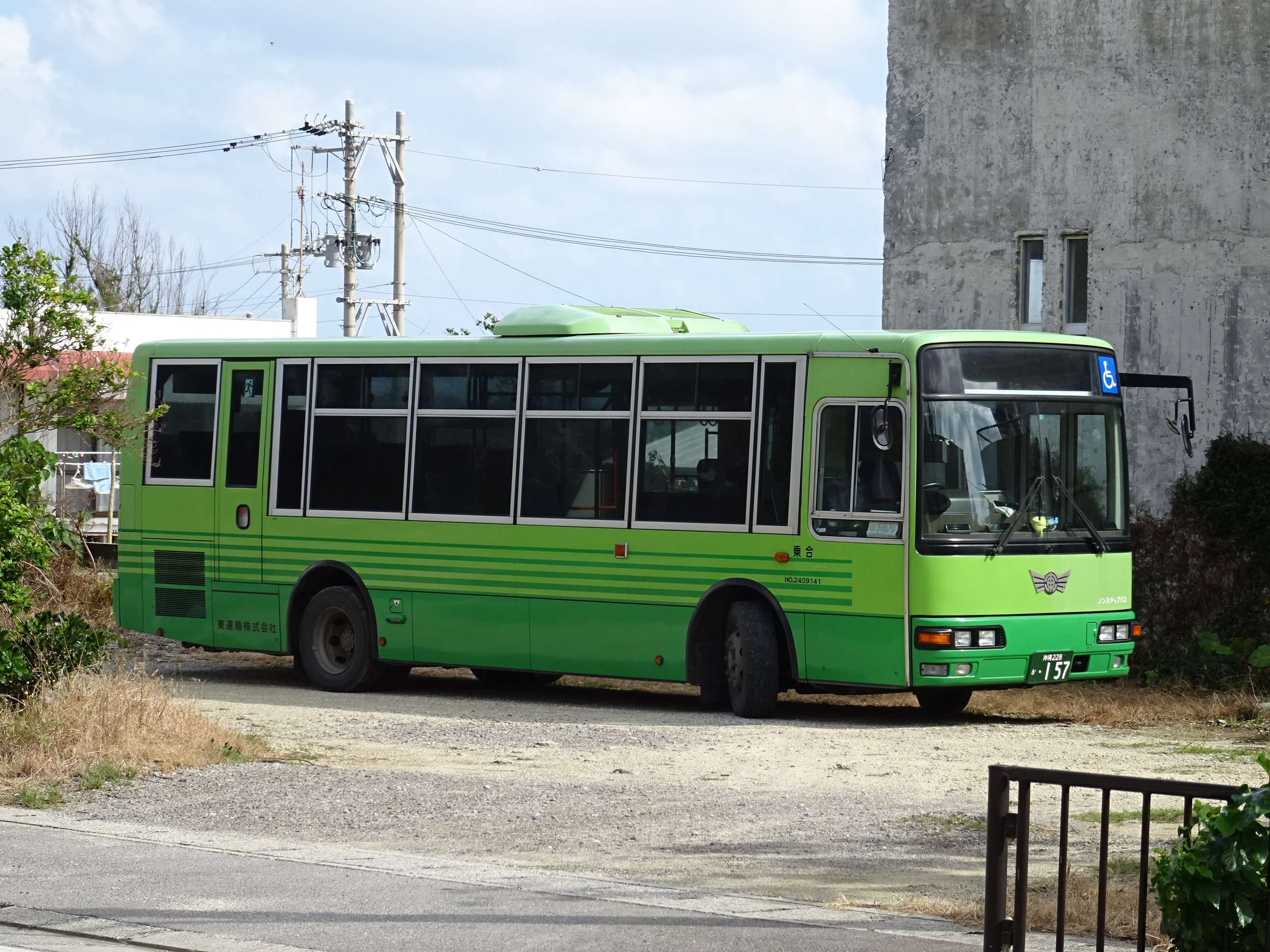 Ibaruma→Yonehara→Kabira→Ishigaki